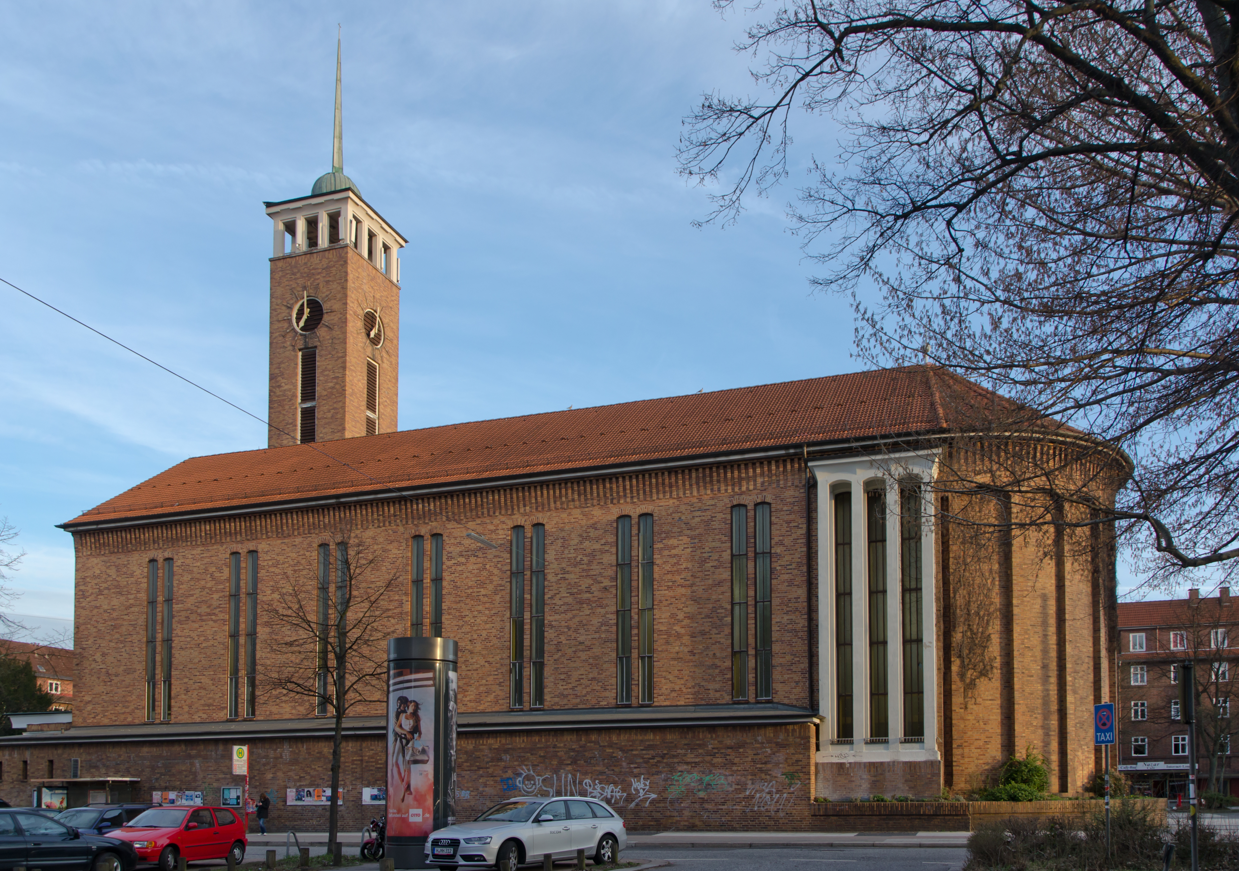 Frohebotschaftskirche HH Dulsberg